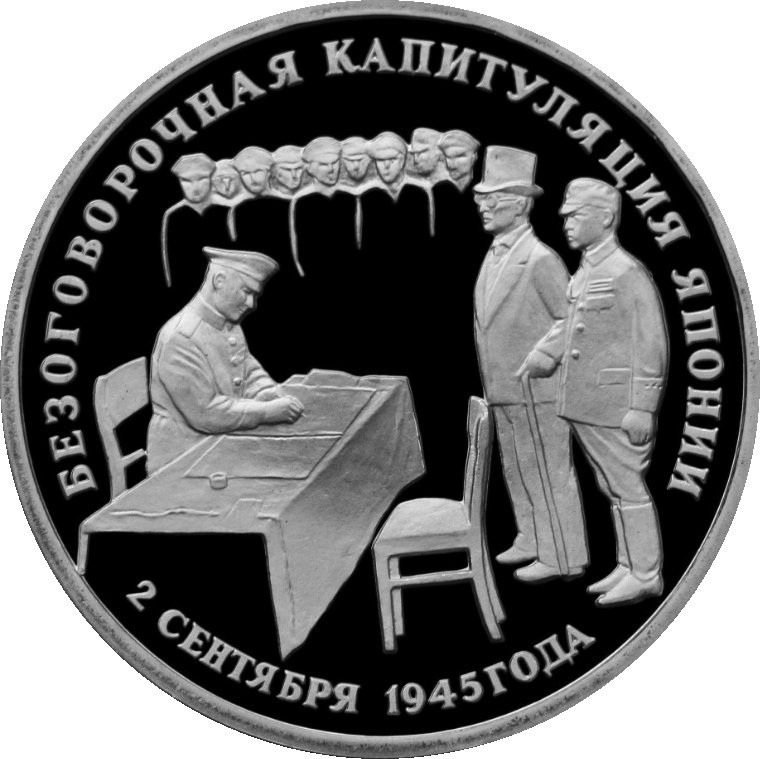 Монета Банка России — Серия: «Великая Отечественная война», 50-летие Победы в Великой Отечественной войне , Безоговорочная капитуляция Японии, 3 рубля, реверс.